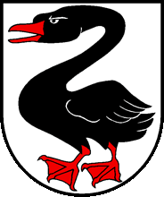 Wappen von Illighausen Kanton Thurgau Schweiz